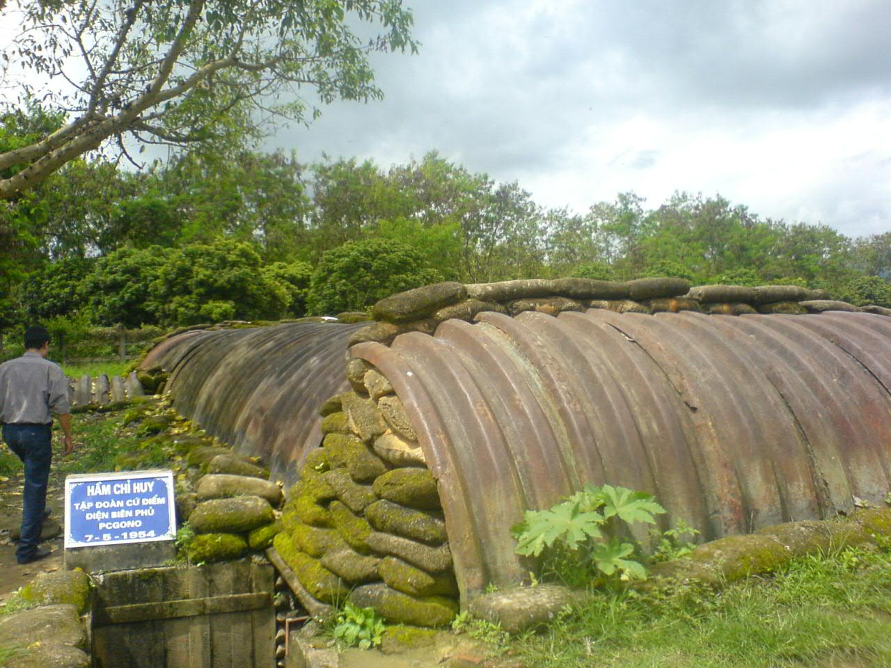 Weekend dans ce lieu historique. Au programme, beau temps, rencontres, moto, et un peu d'histoire.